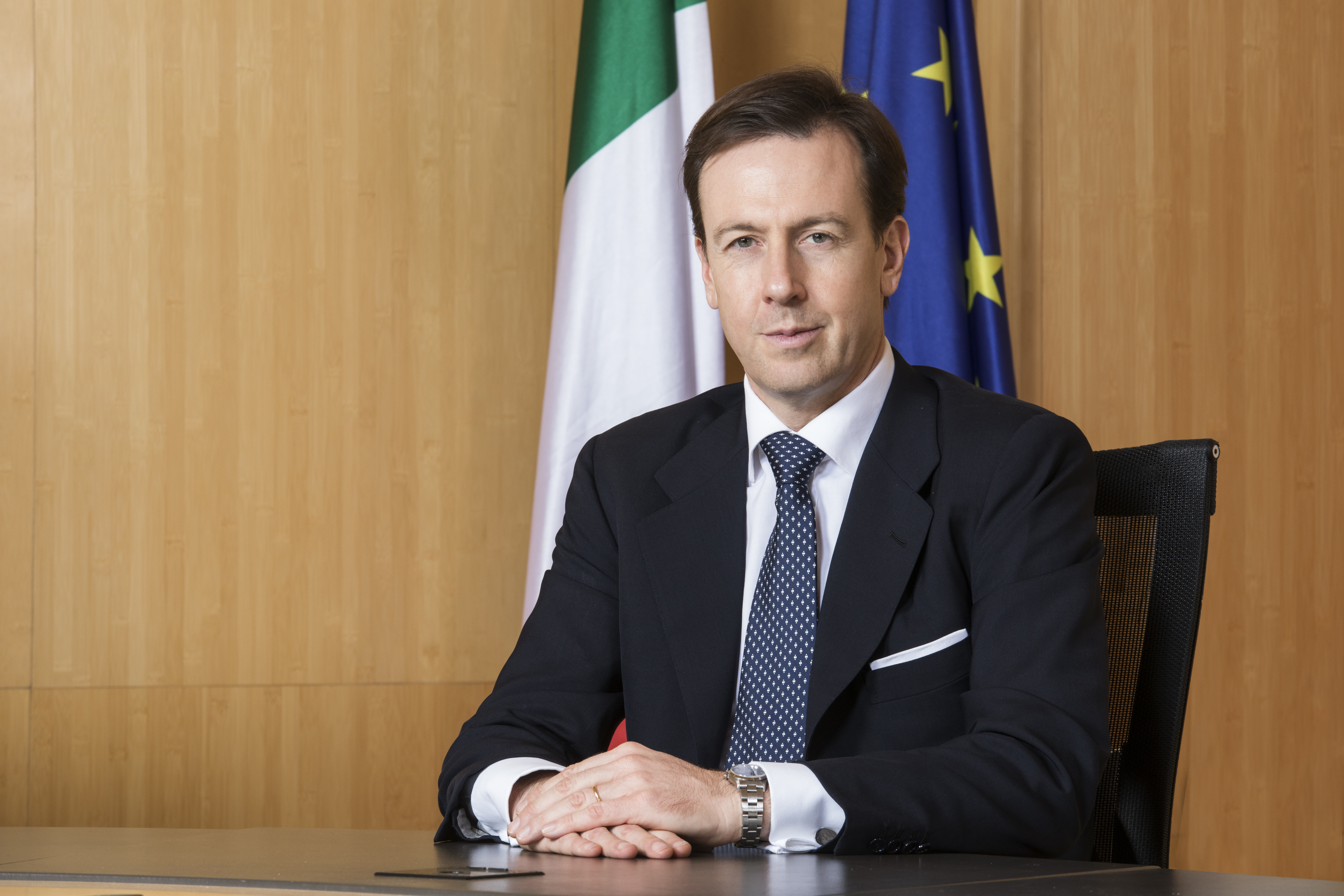 Cassa depositi e prestiti